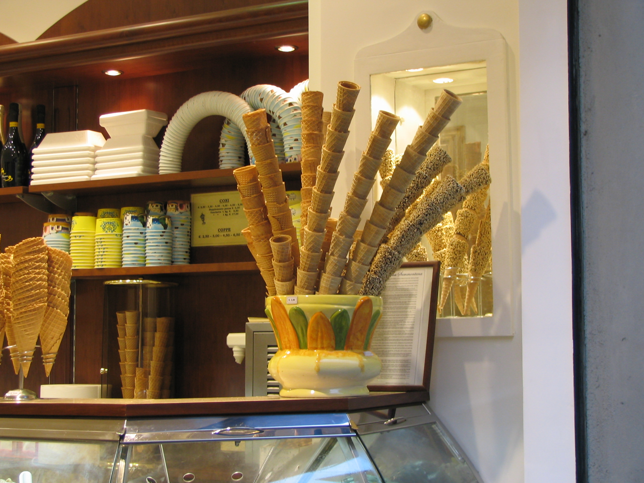 Gelato Cones (Florence)